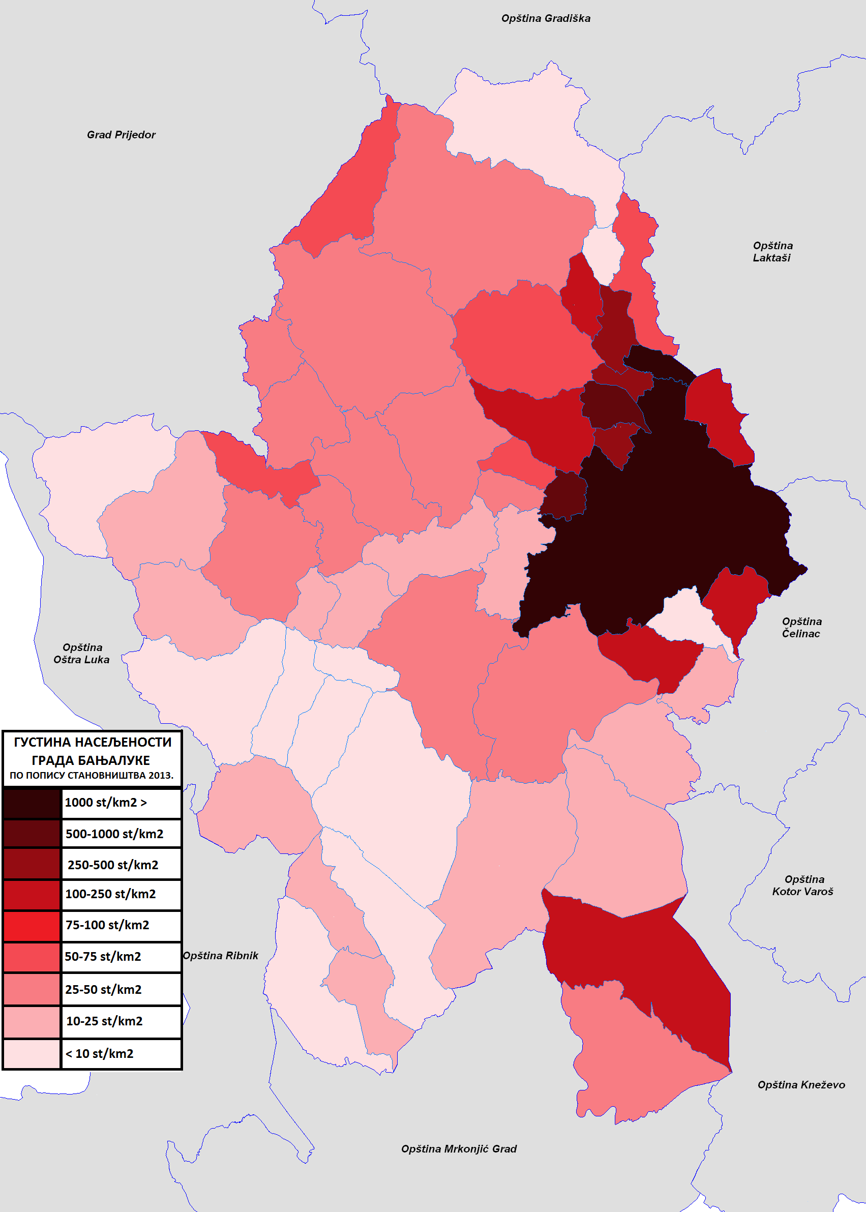 Густина насељености Бање Луке 2013